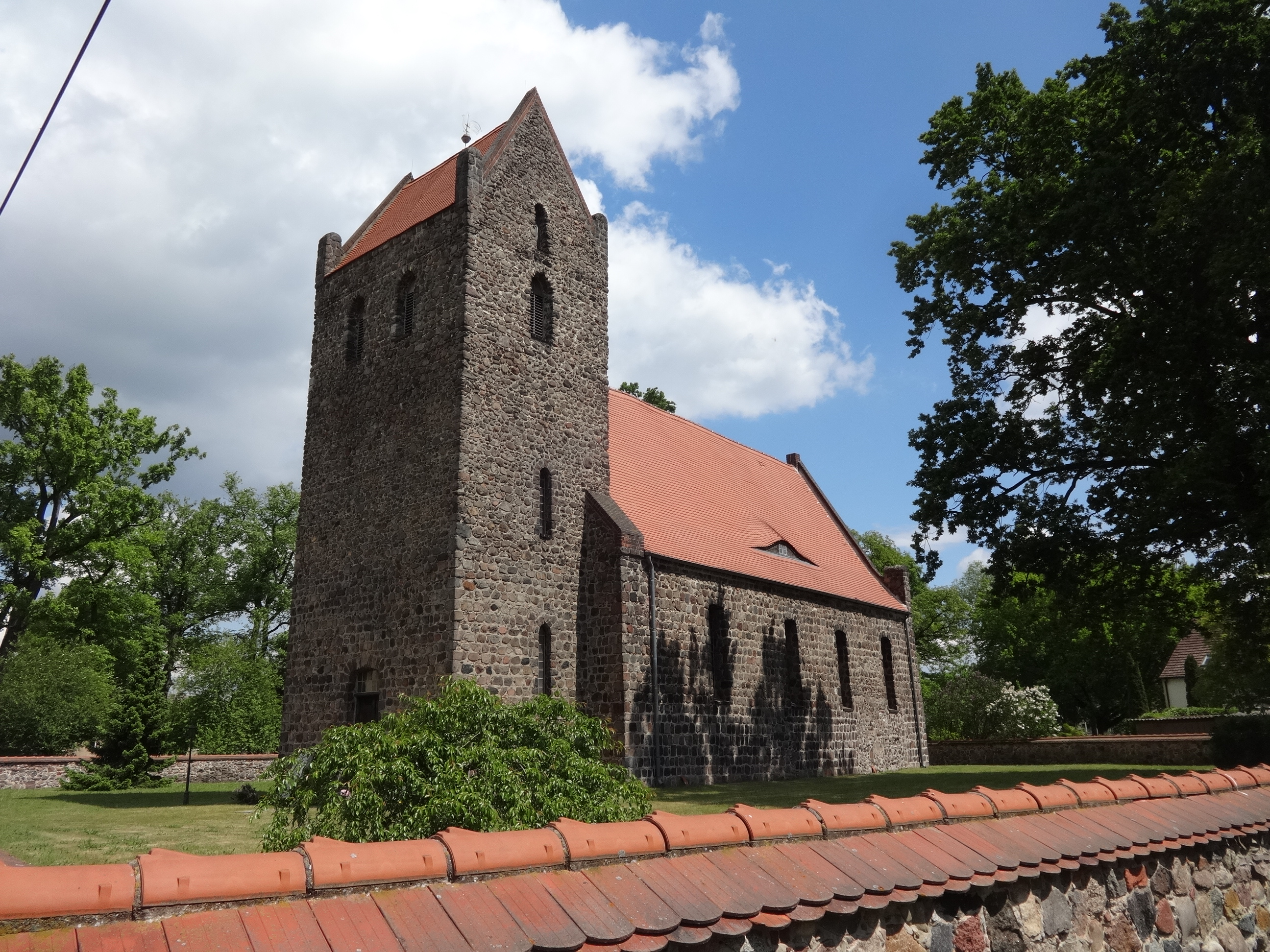 Sankt-Annen-Kirche in Zinndorf, ein Ortsteil von Rehfelde. Die Kirche entstand um 1250. Im Innern befindet sich in einer Nische die Figur der Anna selbdritt.